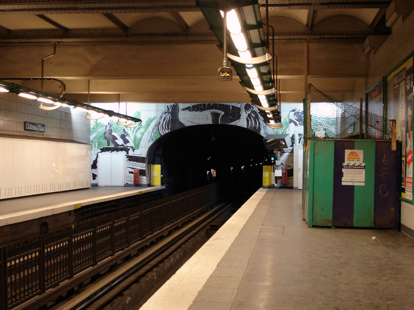 Fresque de la station Château d'Eau de la ligne 4 du métro de Paris, France